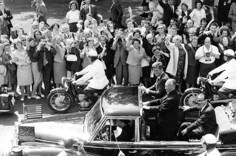 23.6.1963 Besuch des US-Präsidenten John F. Kennedy in der Bundesrepublik Deutschland